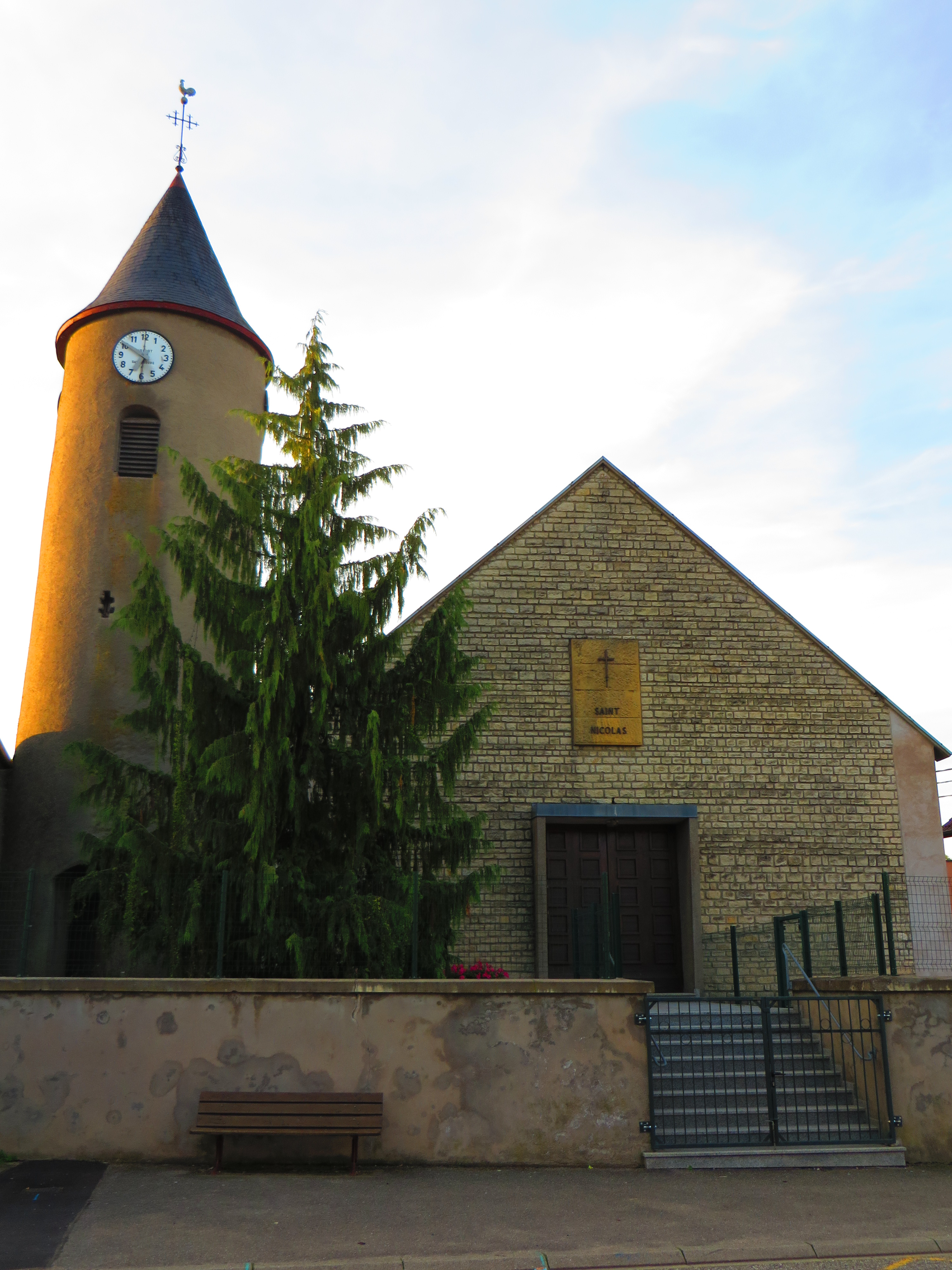 Rodalbe l'église Saint-Nicolas